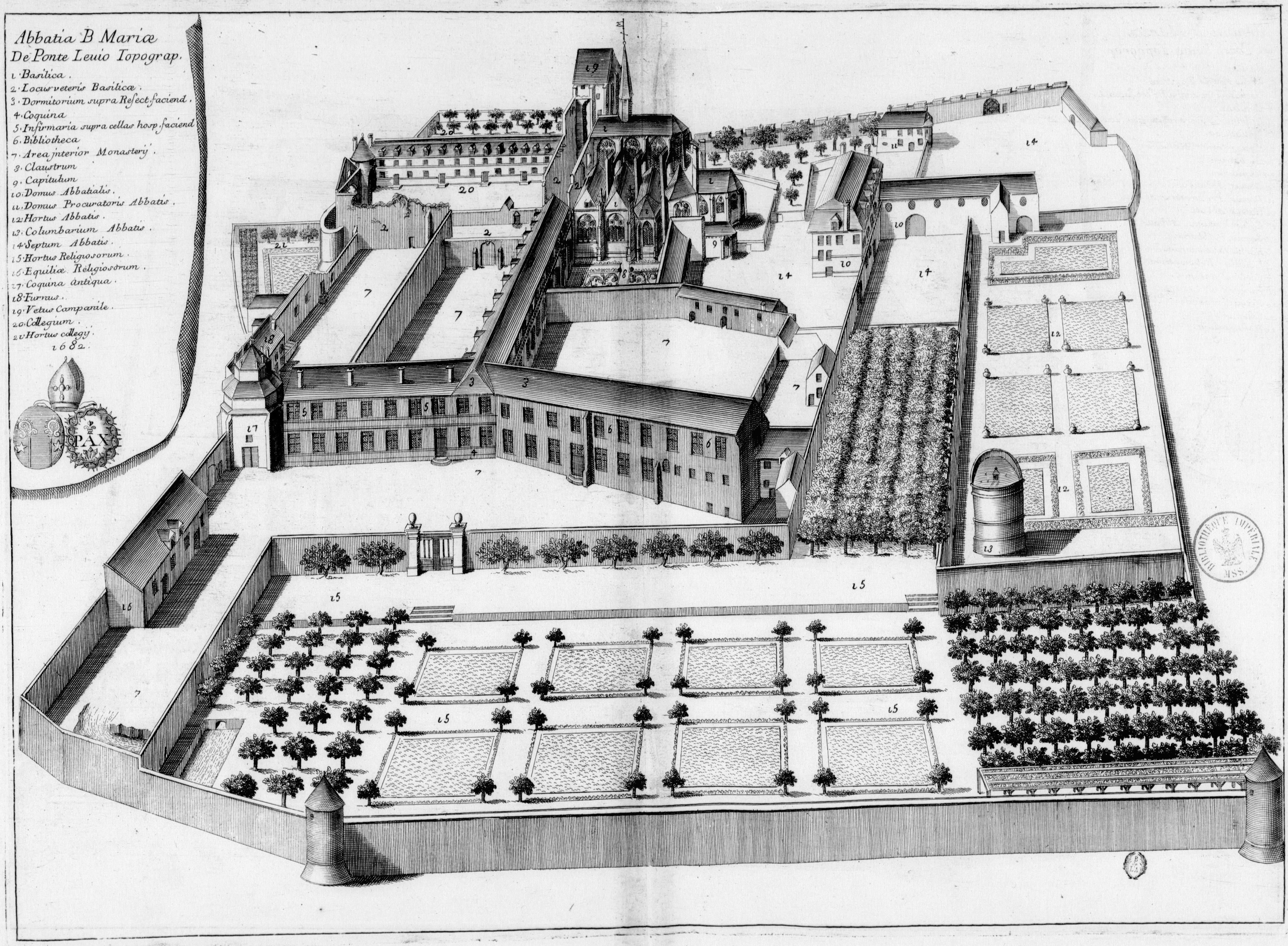 Planche gravée du 17ème siècle représentant l'abbaye de Pontlevoy, en France, dans le livre Monasticon Gallicanum.